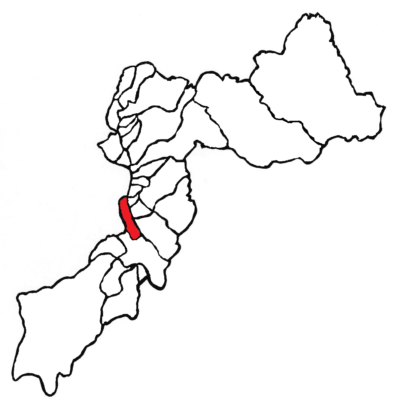 Ubicación del distrito en la provincia de Huancayo, departamento de Junín, Perú